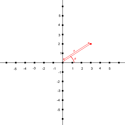 Poolcoördinaat-weergave van het punt (3,2) Illustratie bij het artikel Poolcoördinaten